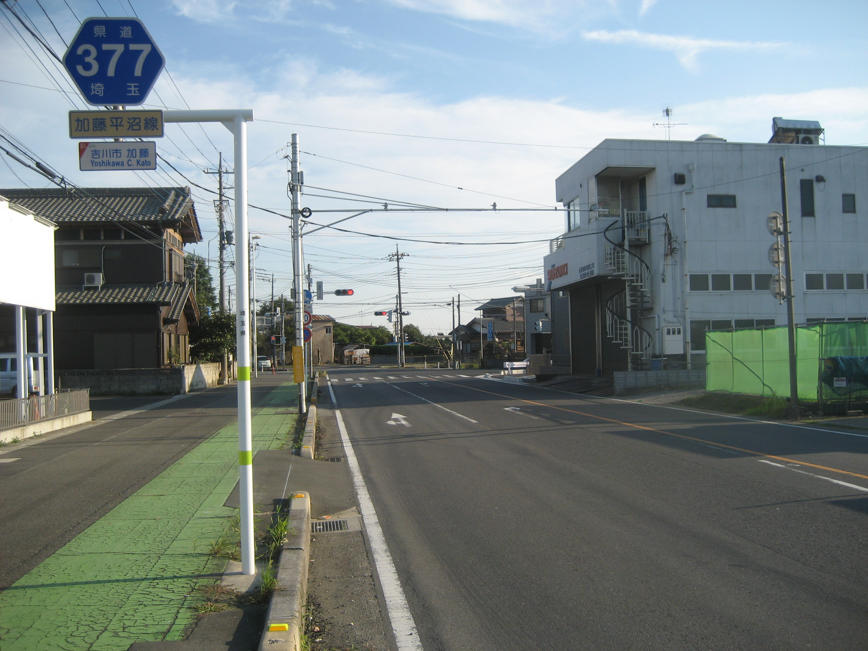 埼玉県道377号線 吉川市加藤付近